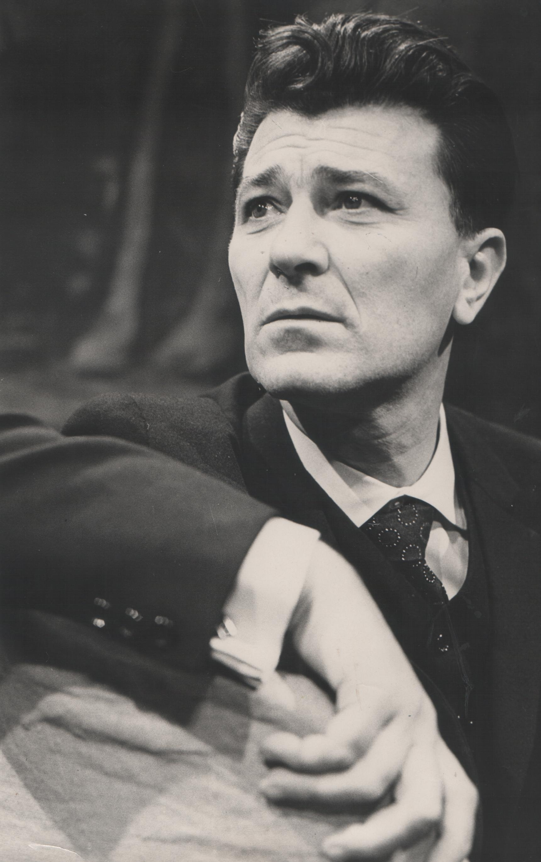 Marijan Lovrić, hrvatski i jugoslovenski pozorišni, filmski glumac. Foto: Stevan Kragujević (po odobrenju kćerke Tanje Kragujević)